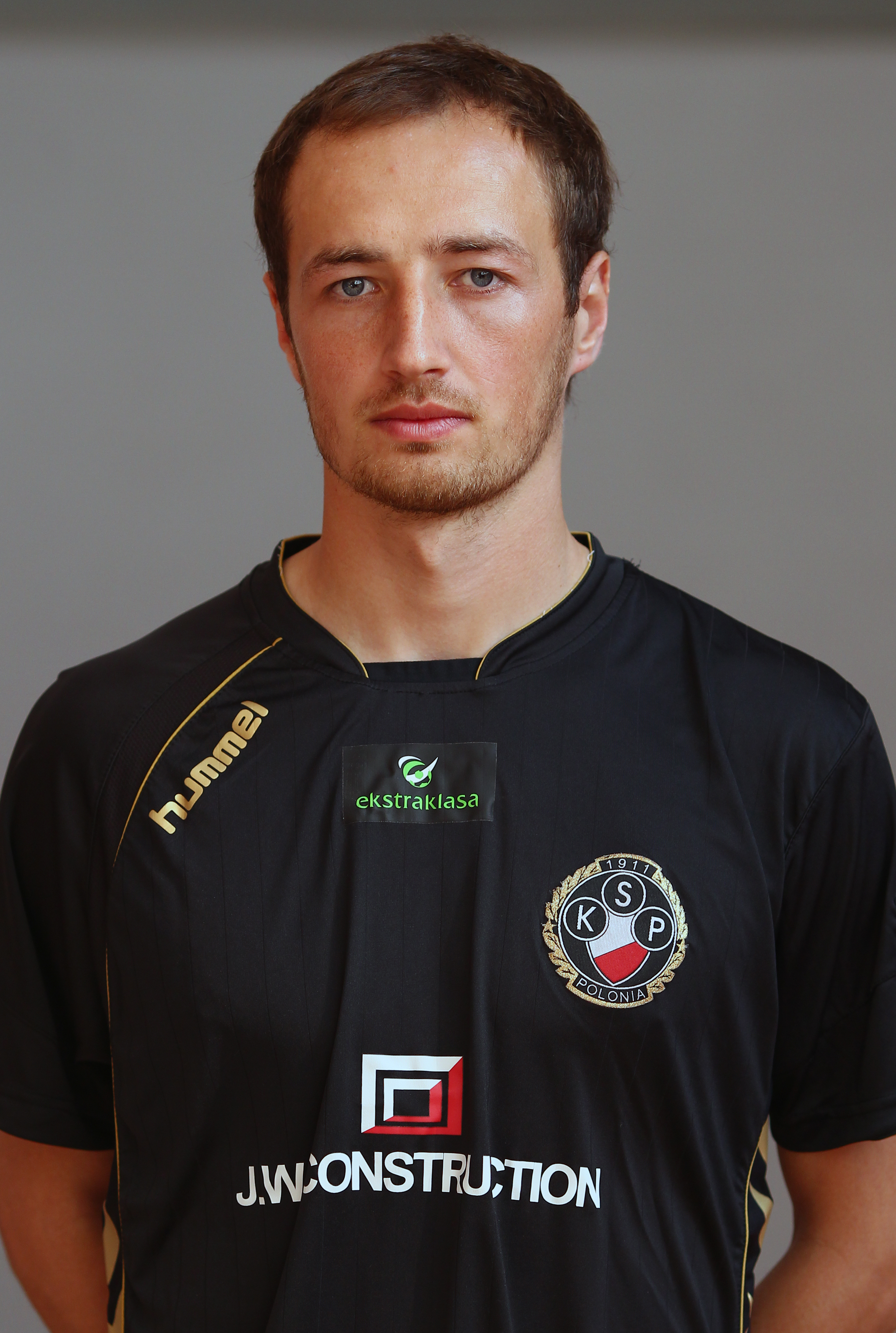 Łukasz Trałka, player of Polonia Warszawa (2011)